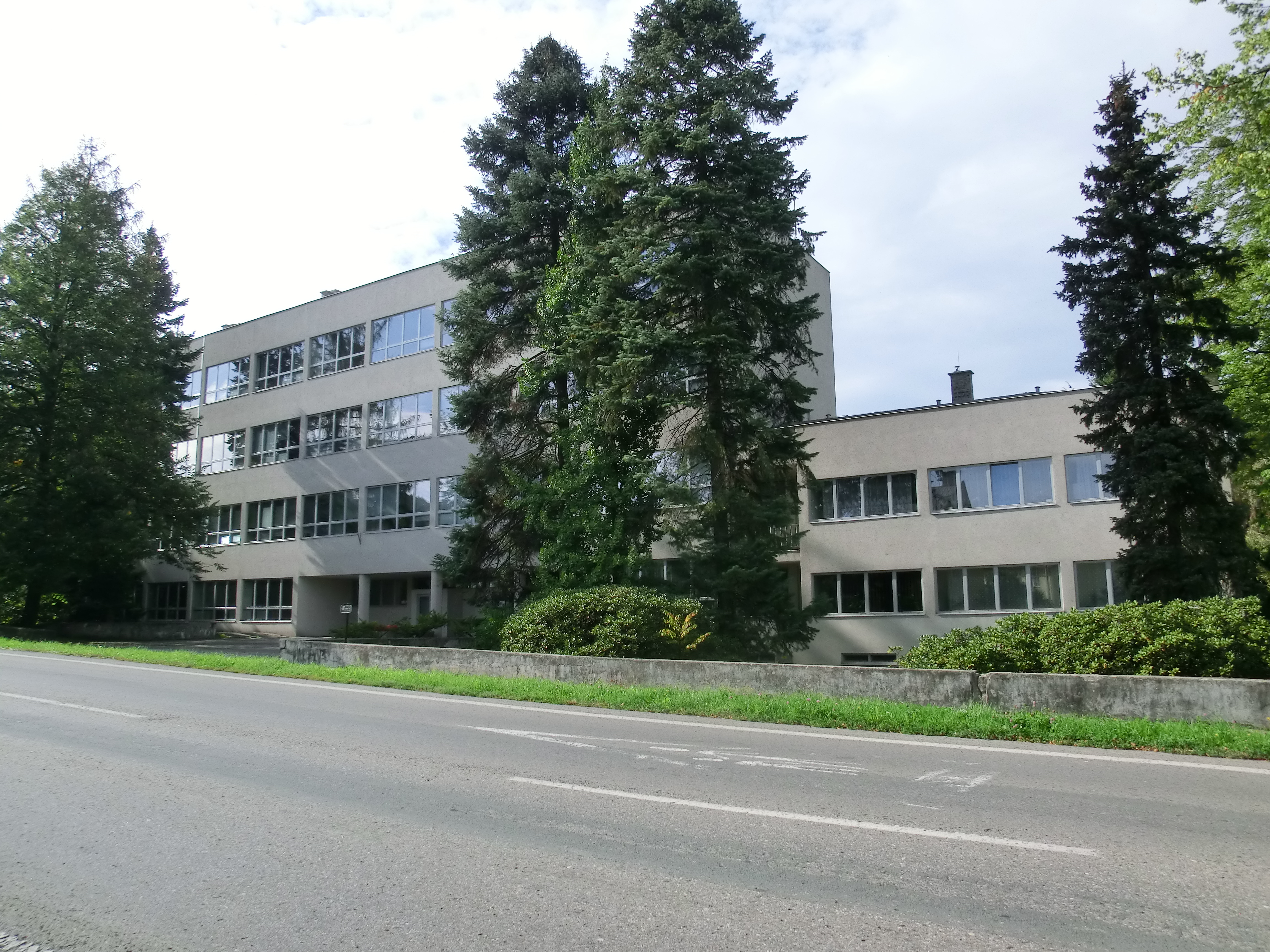 Střední škola - gymnasium (Český Těšín), Frýdecká 30, Český Těšín